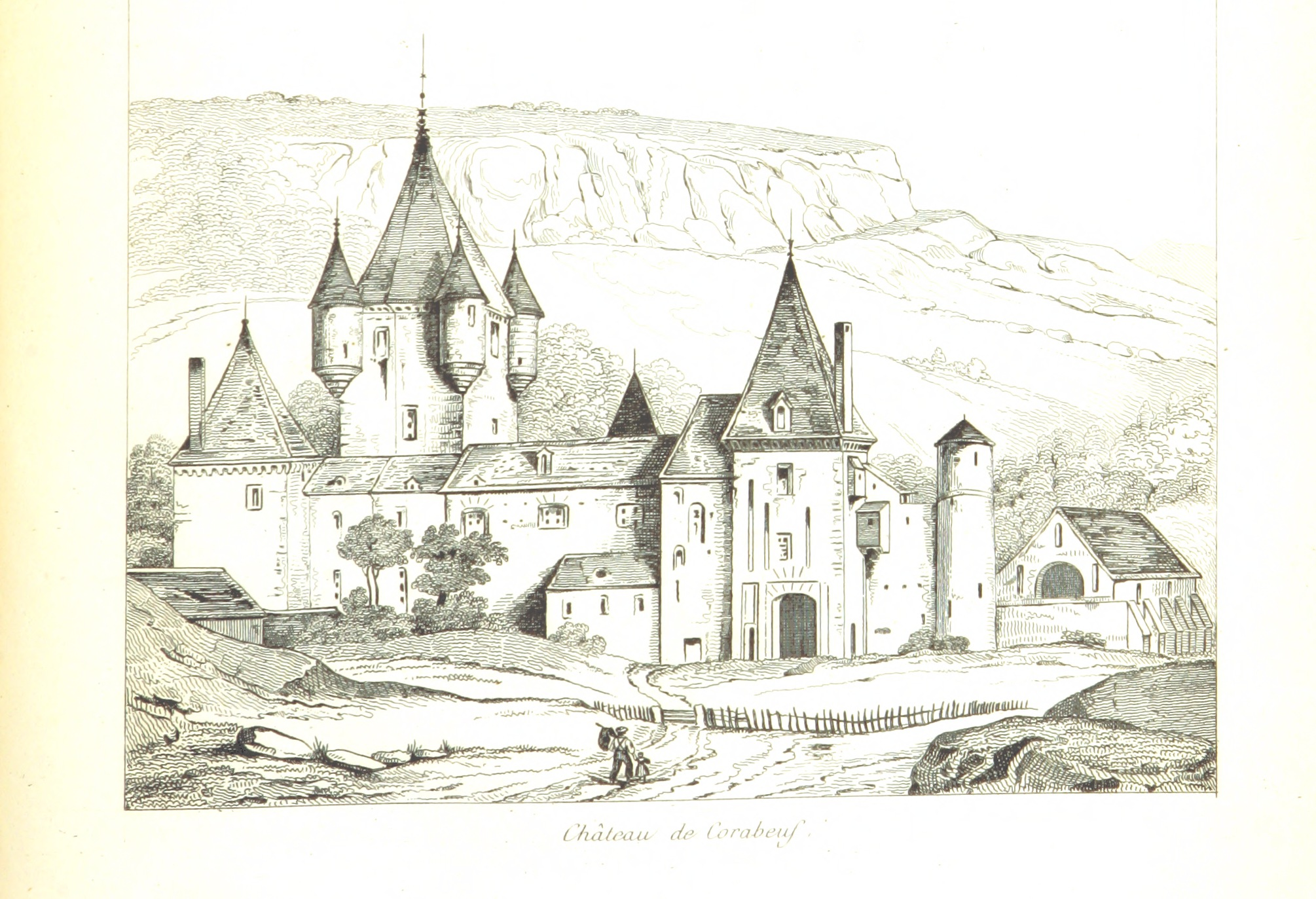 Le château de Corabeuf tel que représenté dans "La France historique et monumentale" de Jean Abel Hugo en 1836